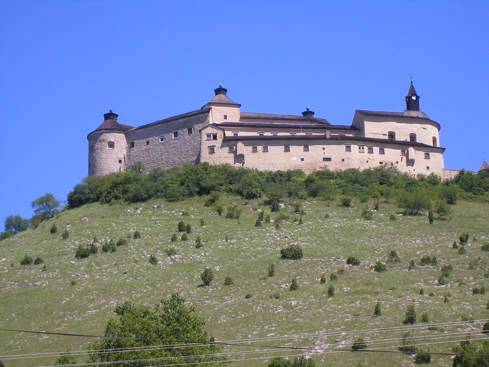 Krasznahorkaváralja - Krasznahorka vára